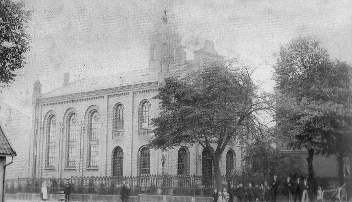 Synagoge Harburg an der Elbe (1862 - 1938/1941)